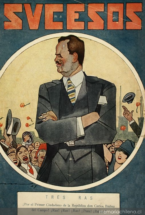 Carlos Ibáñez, símbolo del orden y la modernización. Revista Sucesos (28 abril 1927)